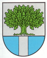 Wappen von Börsborn